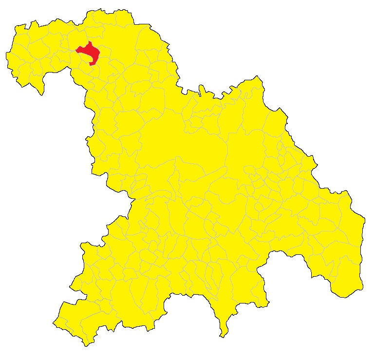 Mappa del comune di Ozzano Monferrato (AL)